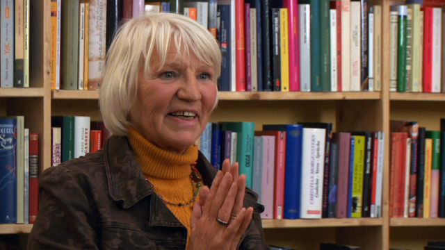 Gelebte Alternativen Heidemarie Schwermer